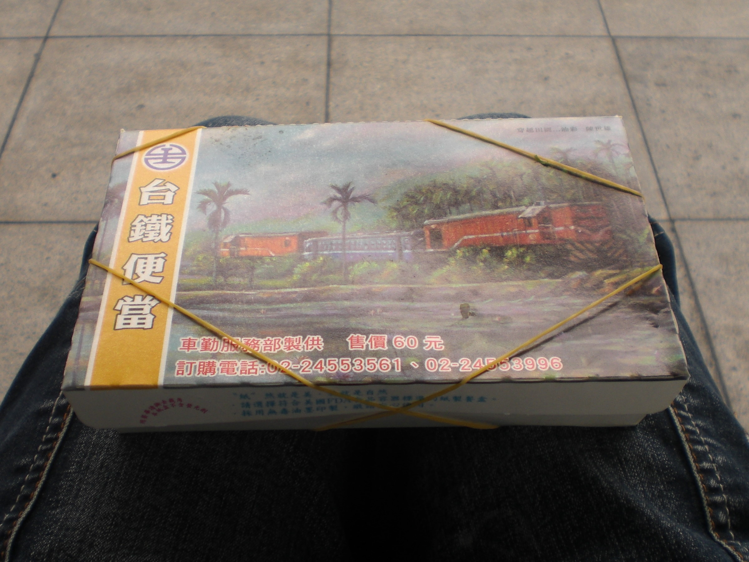 中文（台灣）: 臺灣鐵路管理局汐止車站於2013年3月16日賣出的臺鐵排骨便當